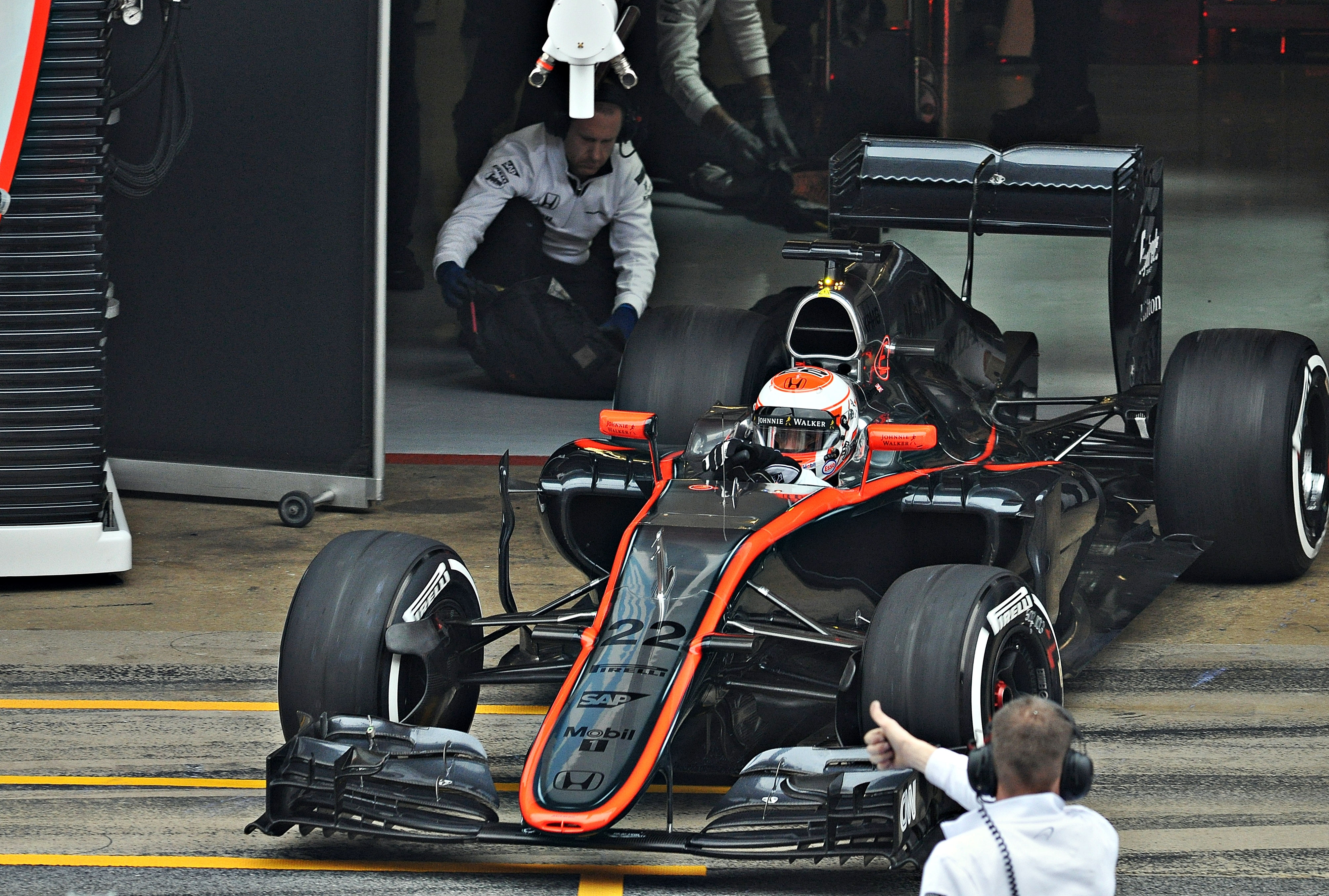 Test days Barcelona 2015